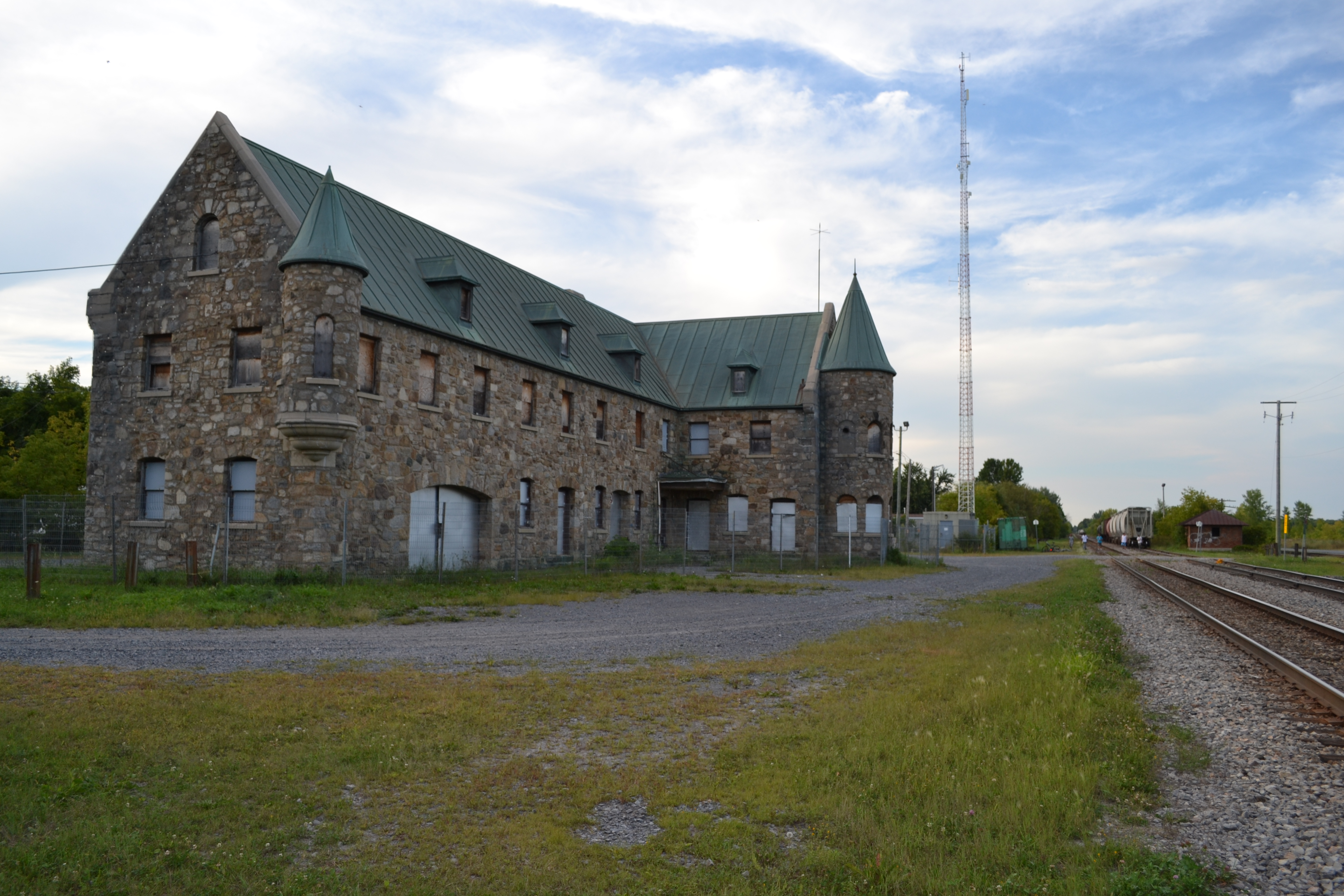 L'ancienne gare de Napierville Jonction est un vaste édifice en pierre de style château construit en 1930.